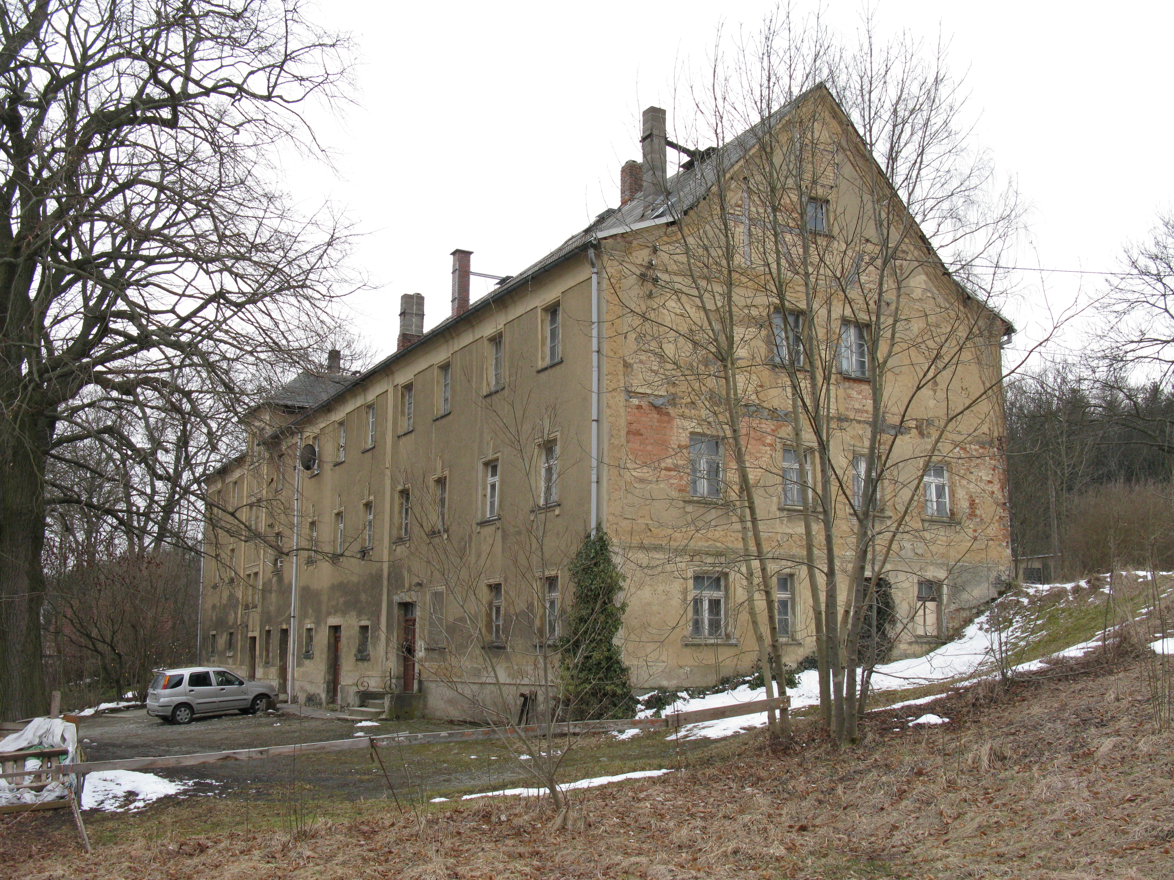 Denkmalgeschütztes Haus an der Straße "Am Gut" (Am Gut 3) im Plauener, Stadtteil Reißig